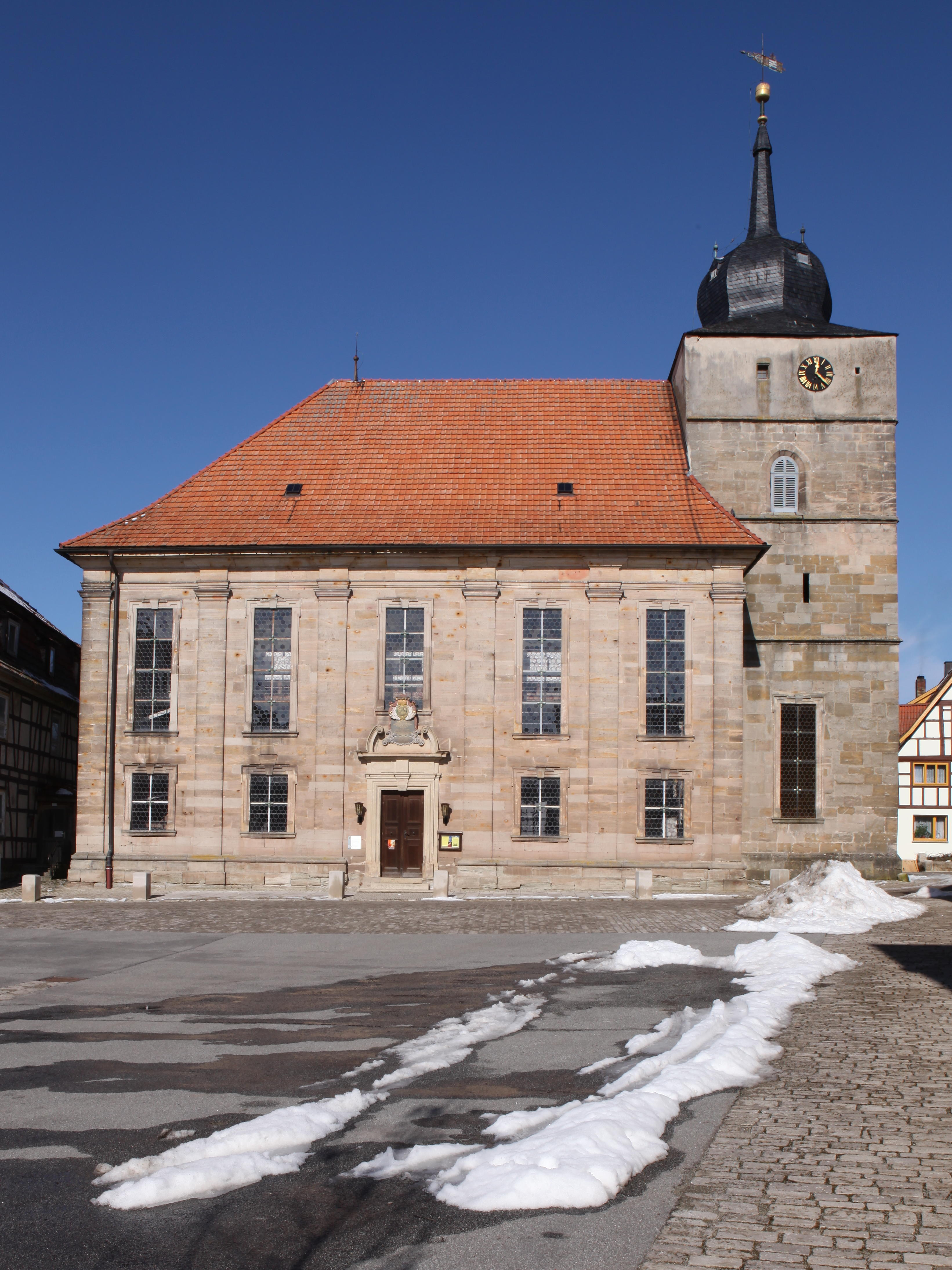 Ev. Stadtkirche St. Bartholomäus in Ummerstadt, Landkreis Hildburghausen